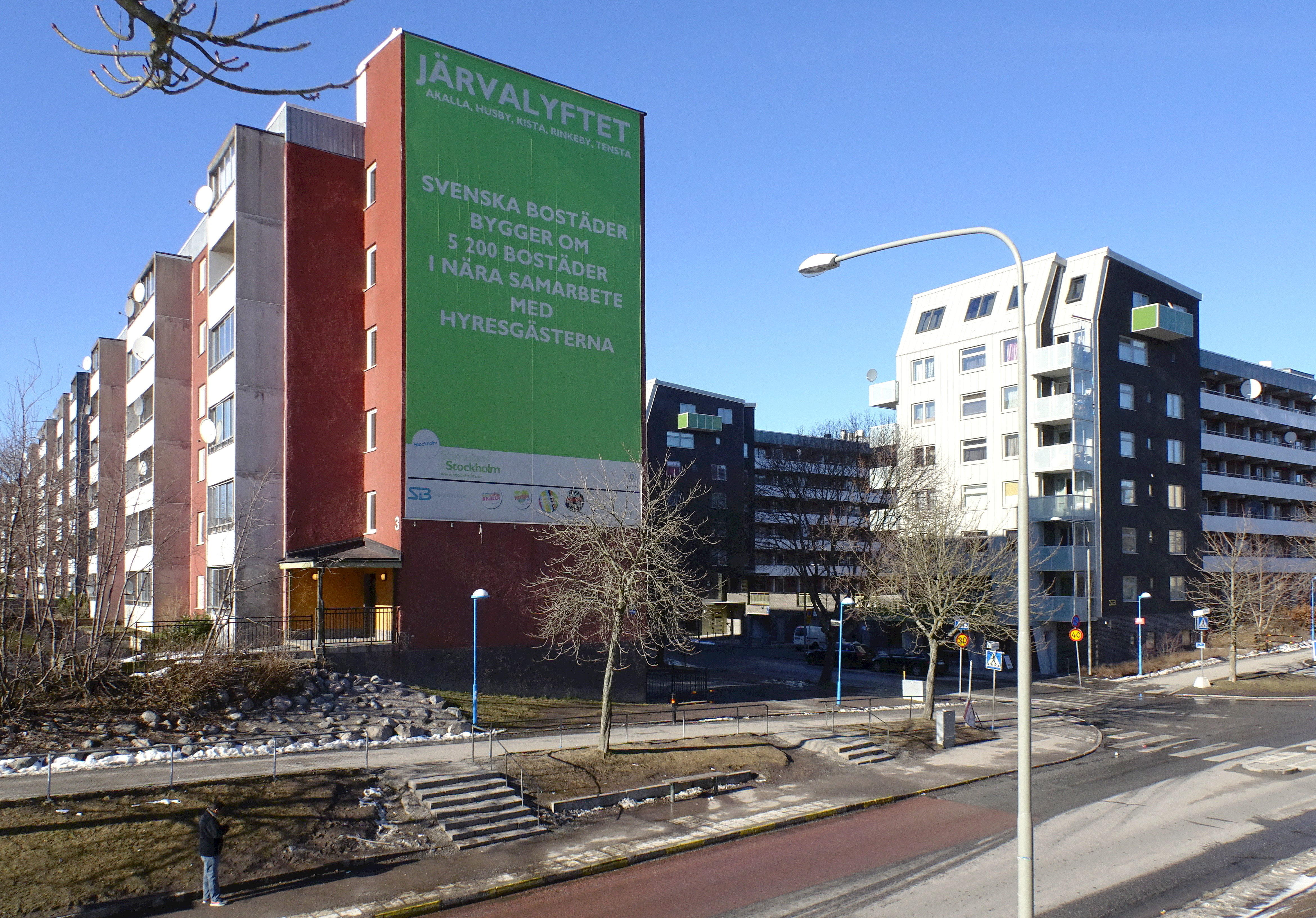 Renovering och upprustning av miljonprogrammets byggnader vid Tenstastråket